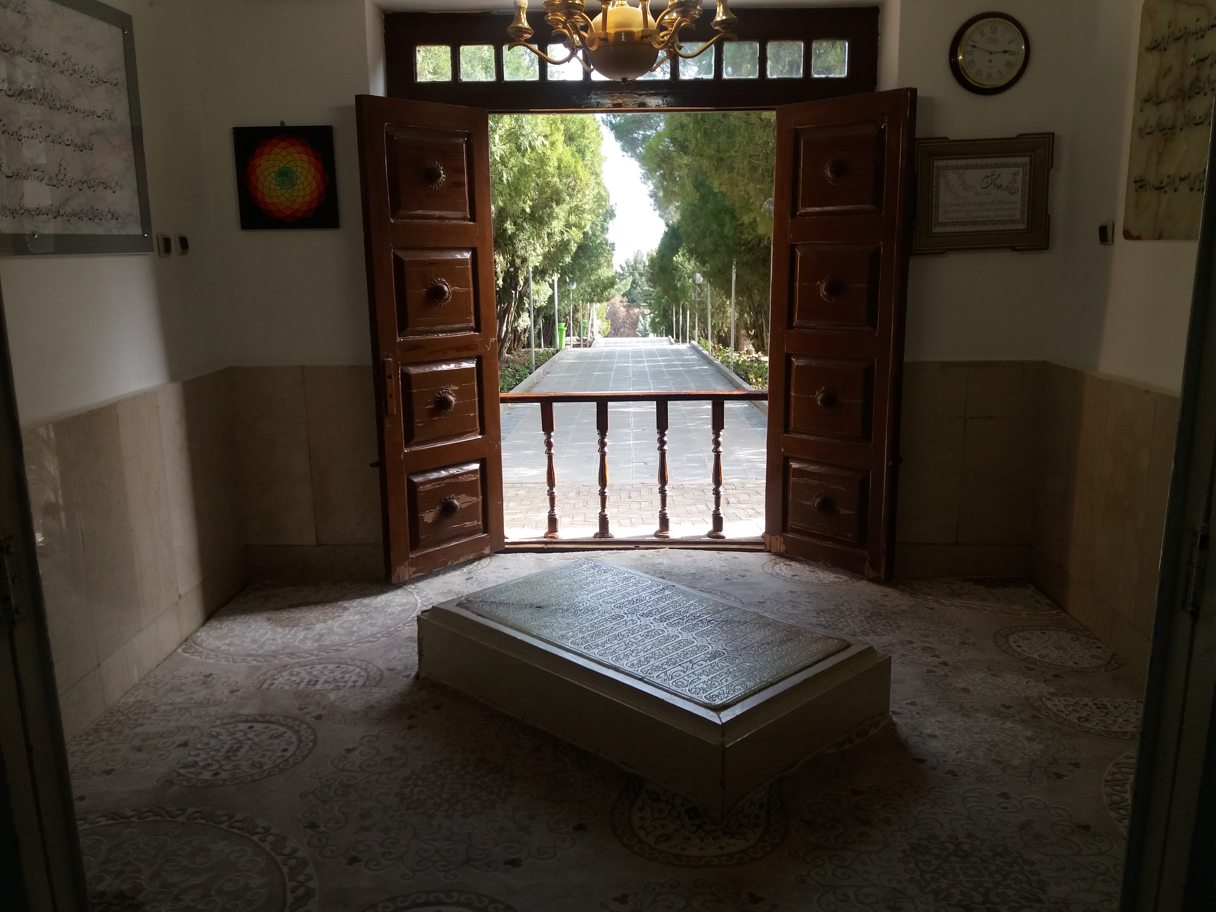 تصویر آرامگاه عارف ایرانی، شیخ ابوالحسن خرقانی